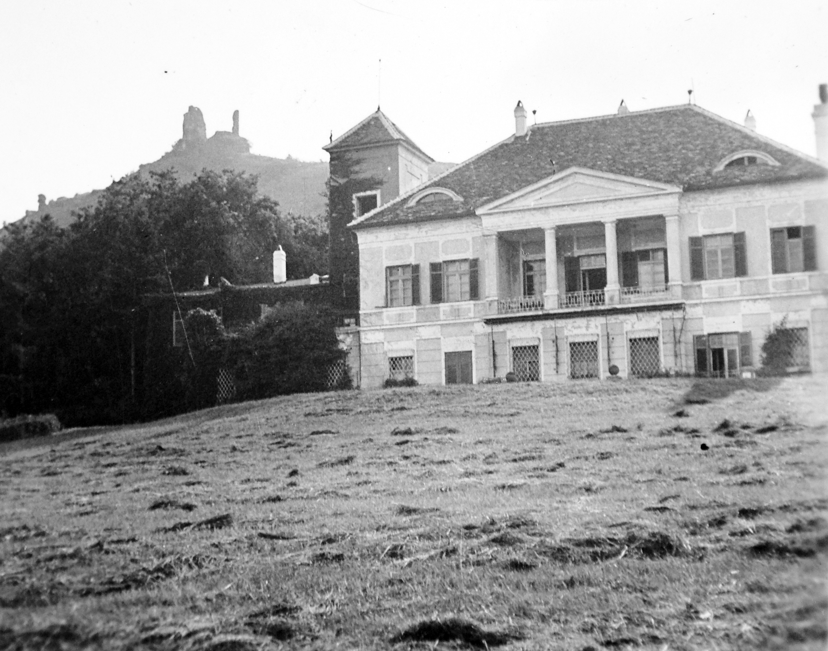 Esterházy kastély, háttérben a vár. Location: Hungary, Szigliget Title: Esterházy kastély, háttérben a vár.